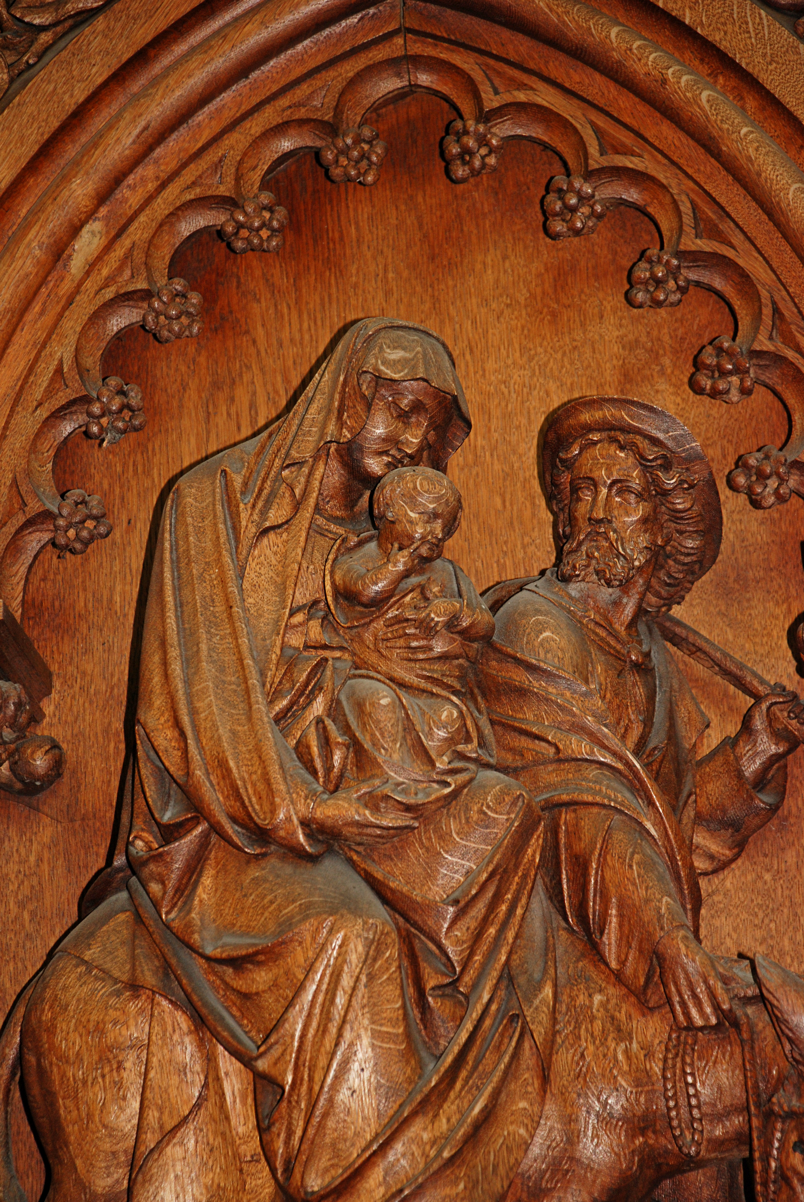 Belgique - Brabant wallon - Ottignies-Louvain-la-Neuve - Céroux - église Notre-Dame de Bon Secours (néo-gothique, Antoine Moreau, 1848)